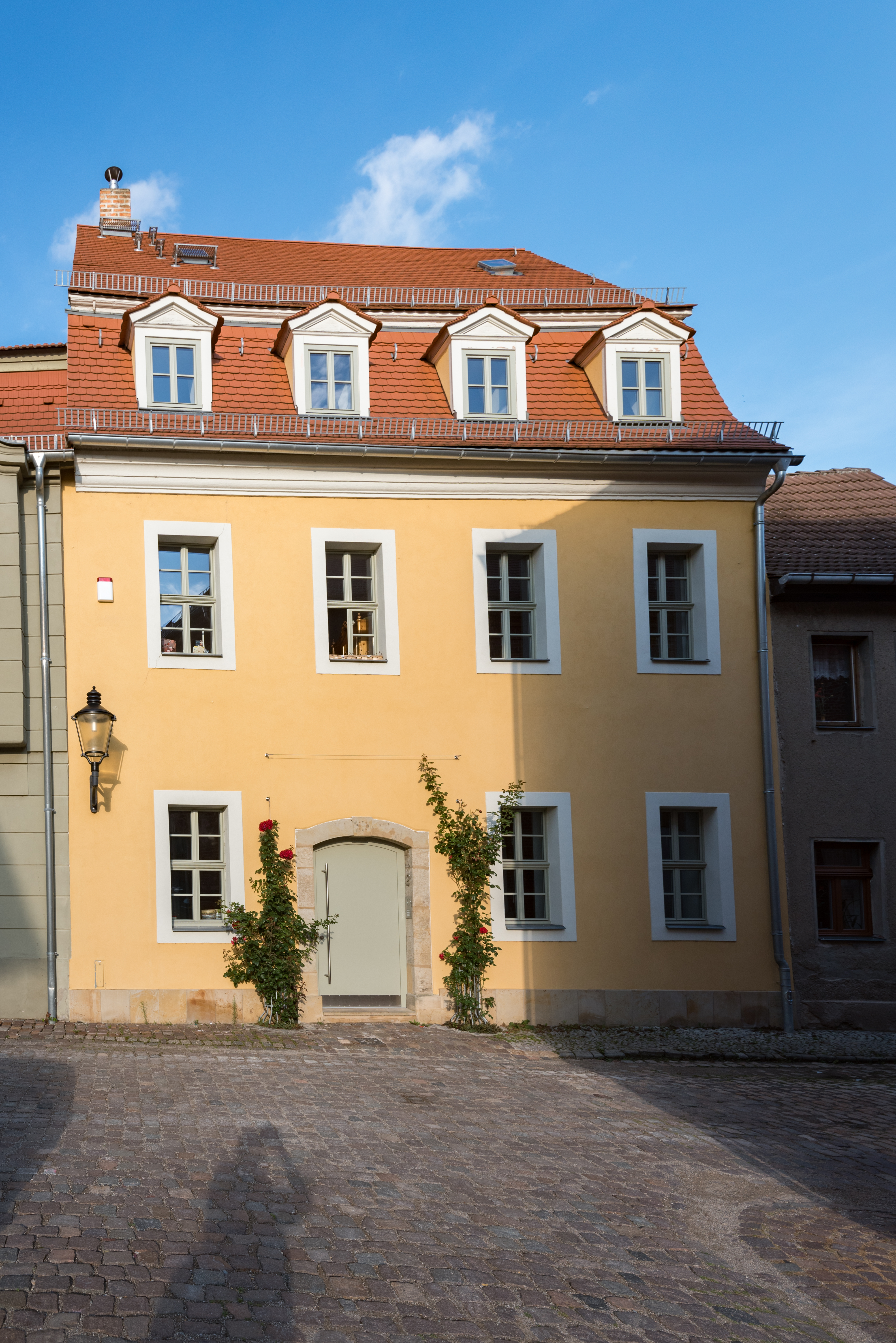 Naumburg (Saale), Marienplatz 2